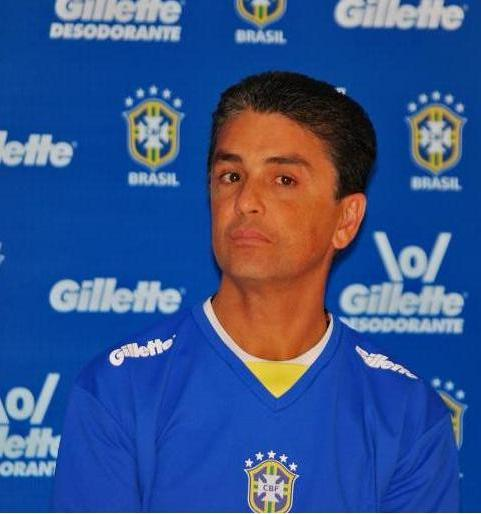 Bebeto em 2010.